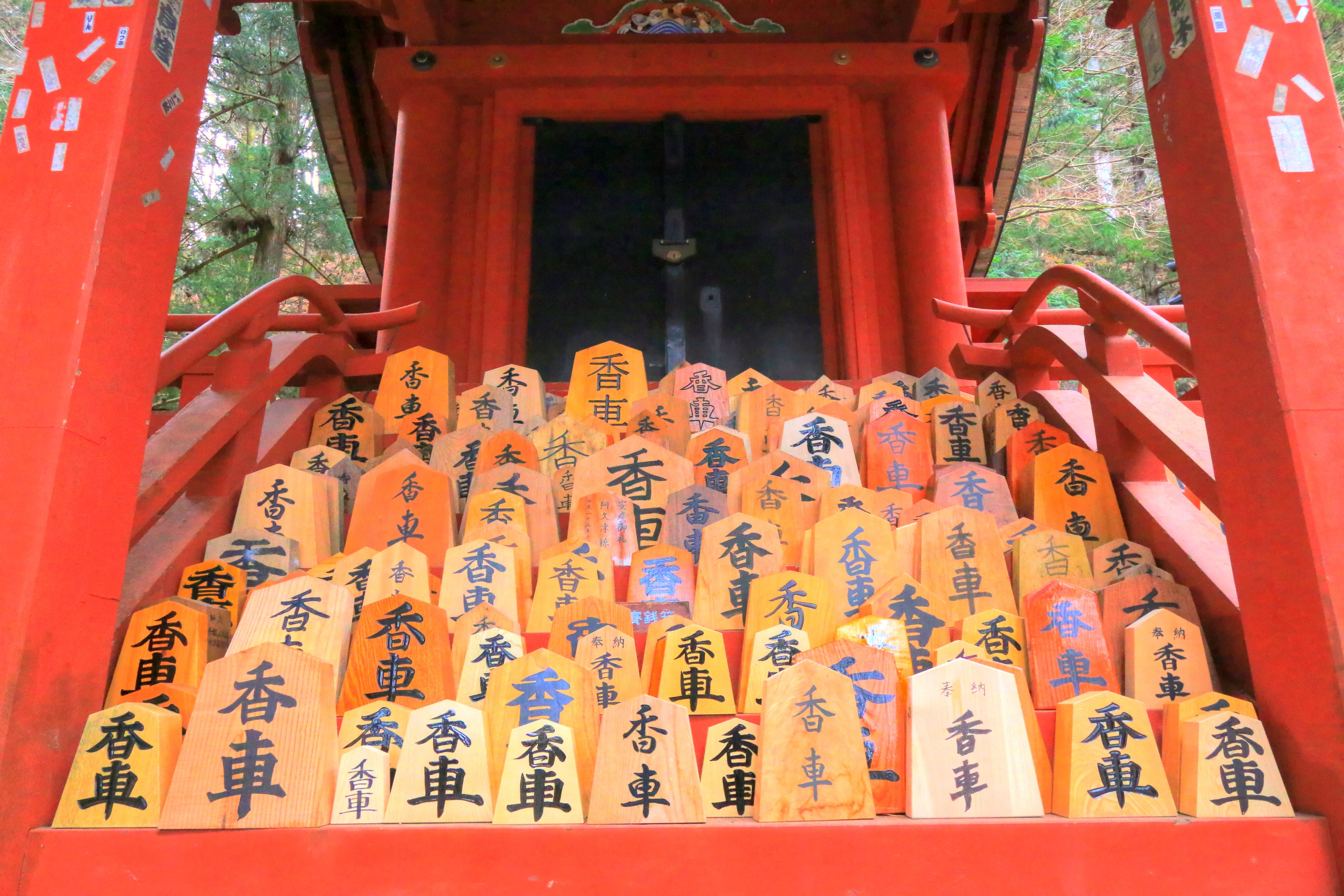 栃木県日光市、観音堂、産の宮、香車堂 Canon EOS 70D